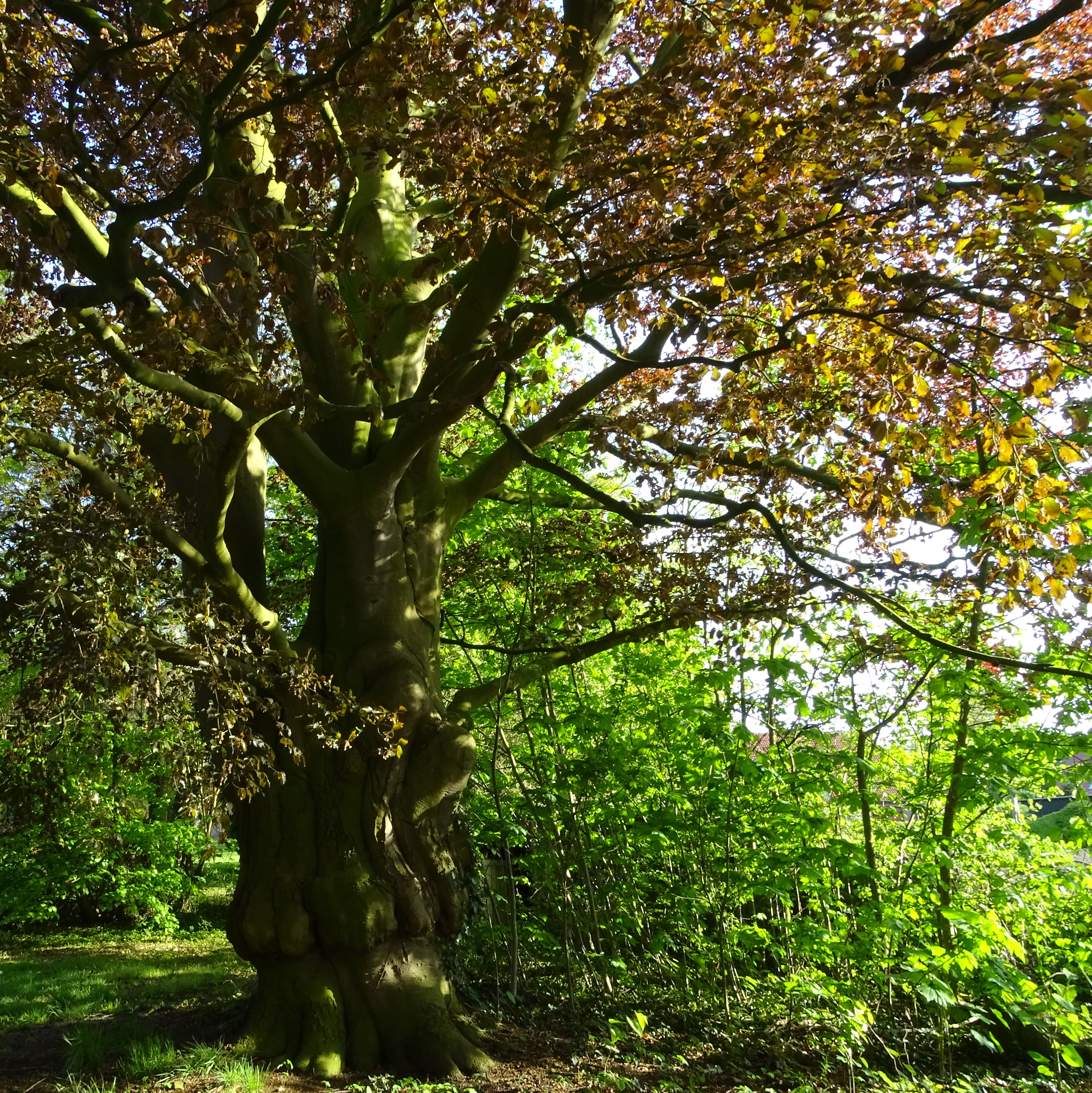 Es handelt sich um eine Buche in Uthlede, Deutschland die seit 1995 ein Naturdenkmal ist.